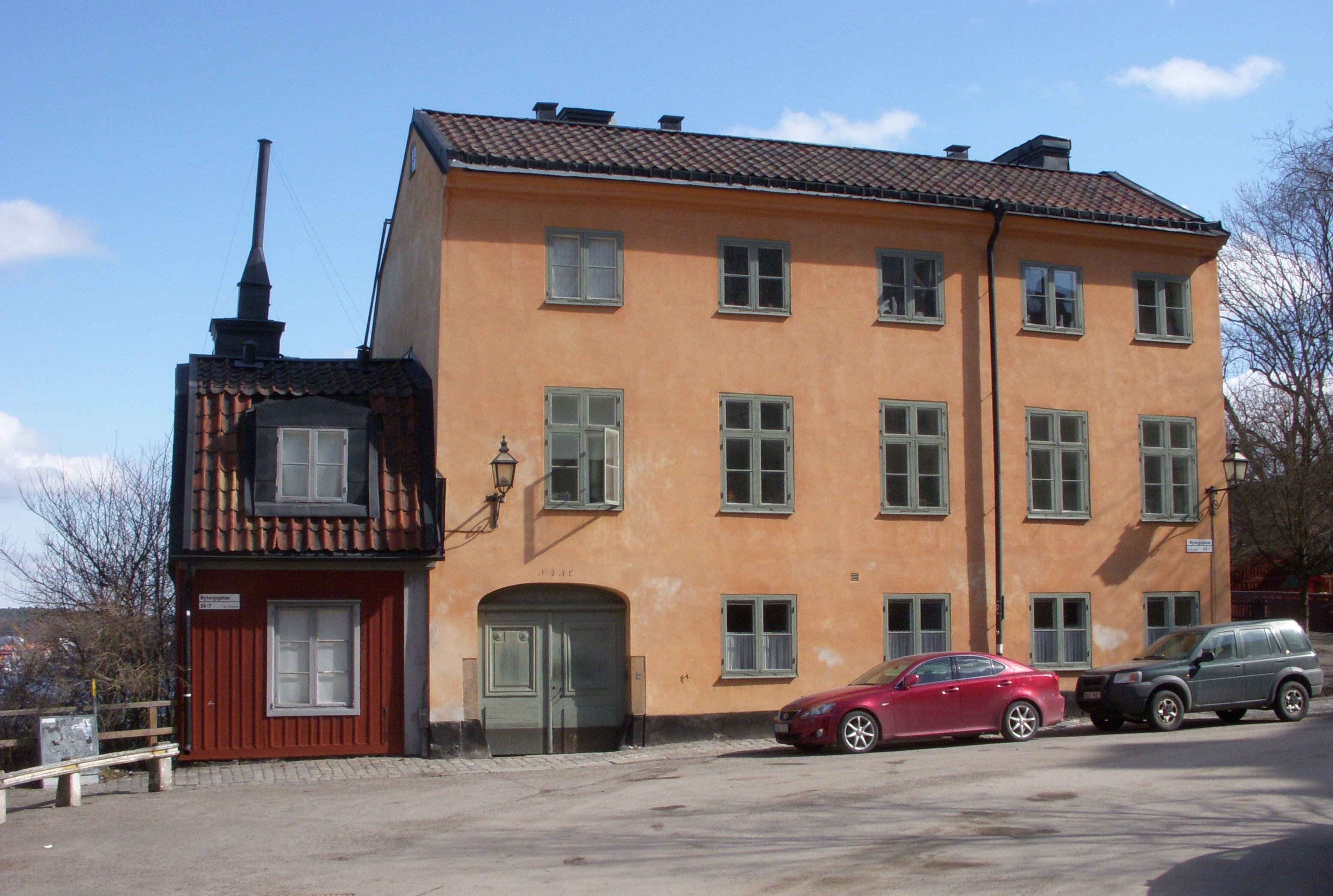 Nytorgsgatan 5, Södermalm